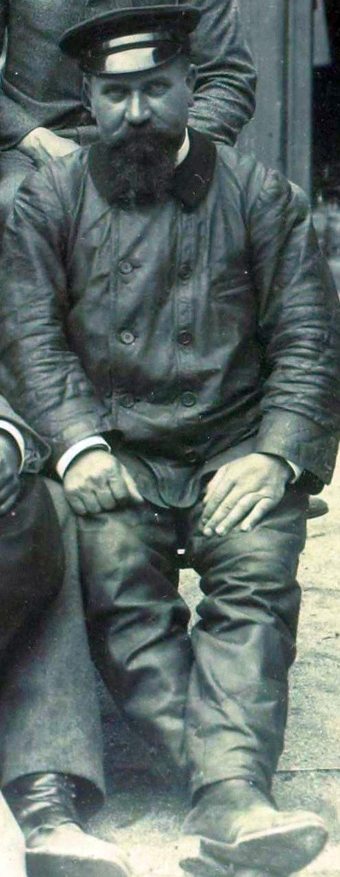 [Collection Jules Beau. Photographie sportive] : T. 10. Année 1899 / Jules Beau : F. 7v. [Course automobile du Tour de France, 1899]